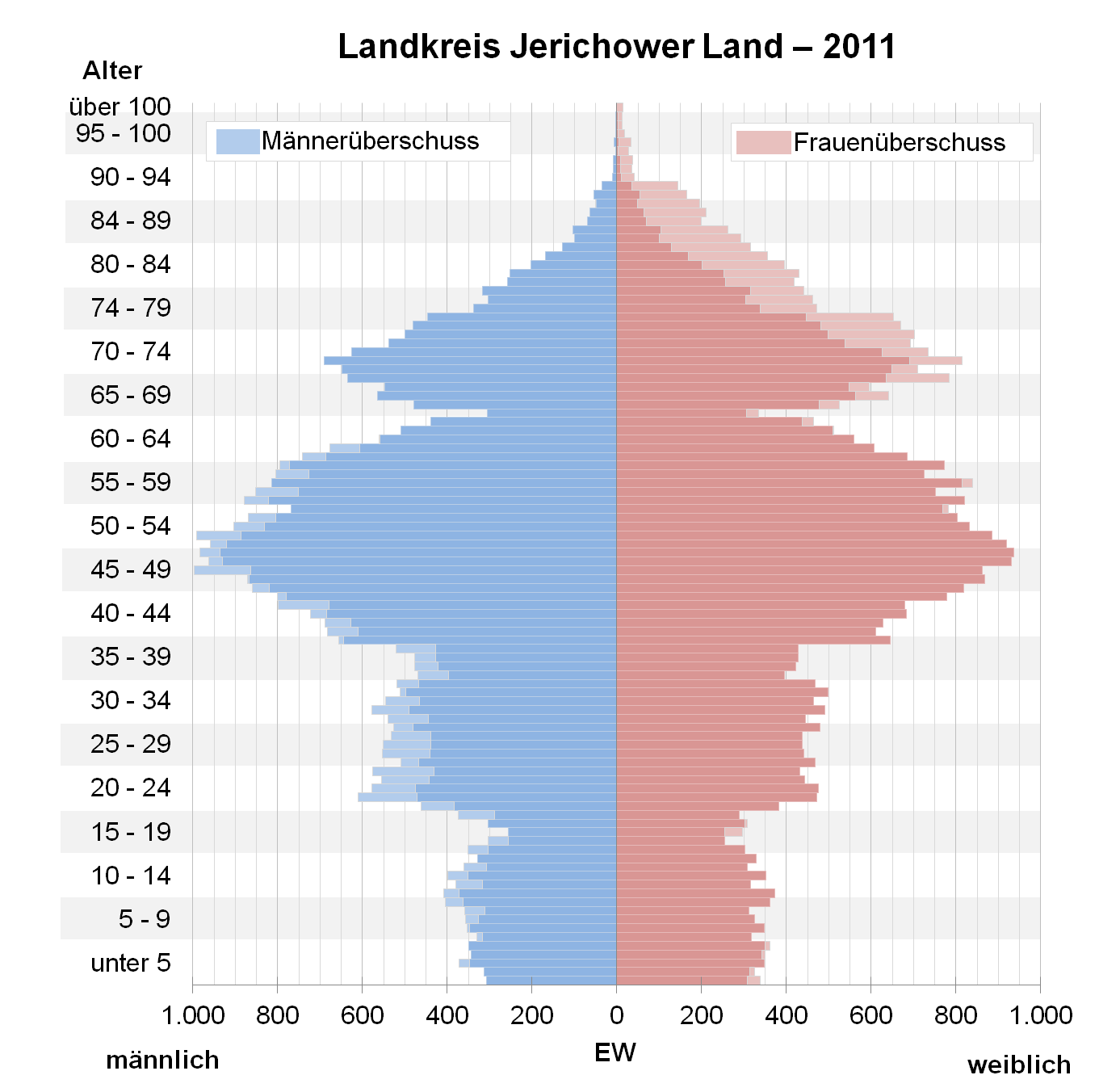 Bevölkerungspyramide des Landkreises Jerichower Land nach Zensus 2011.